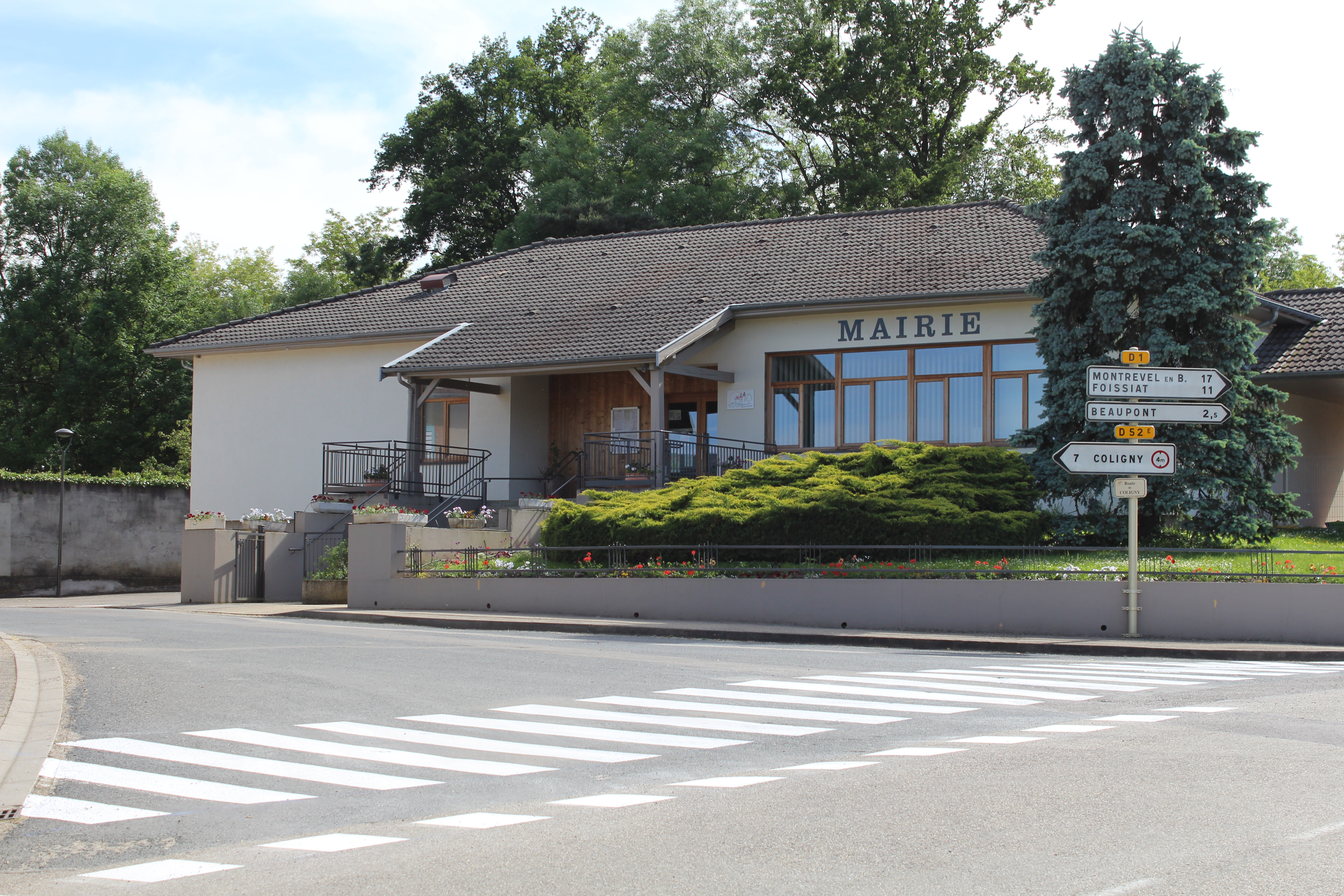 Mairie de Domsure.